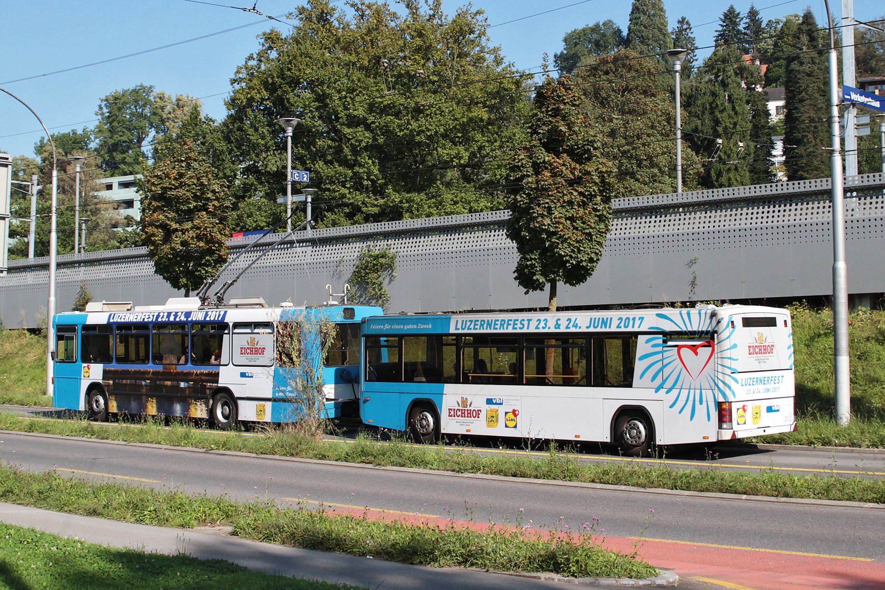 Der Anhängerzug der Verkehrsbetriebe Luzern bestehend aus NAW/Hess-Trolleybus Nr. 260 und Lanz+Marti/Hess-Anhänger Nr. 312 wirbt seit 2015 für das Luzerner Fest. Hier eine Heckansicht in unmittelbarer Nähe zur Haltestelle Verkehrshaus.